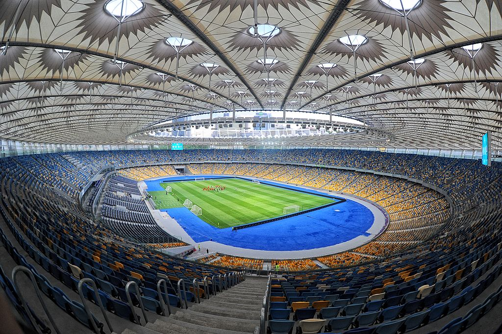 2017/2018 mövsümü UEFA Çempionlar Liqasının finalının keçiriləcəyi stadion